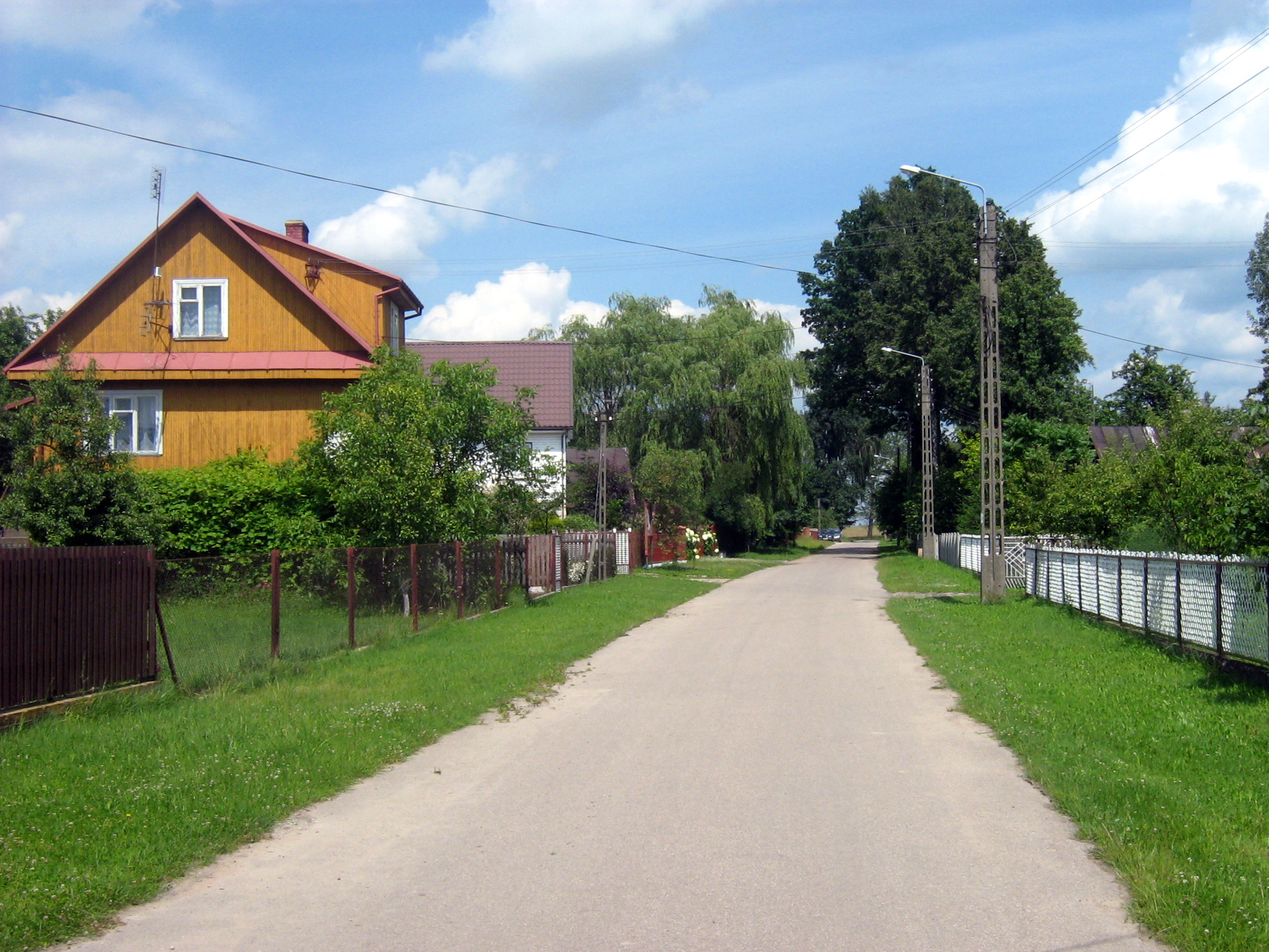 Droga w Wygodzie.